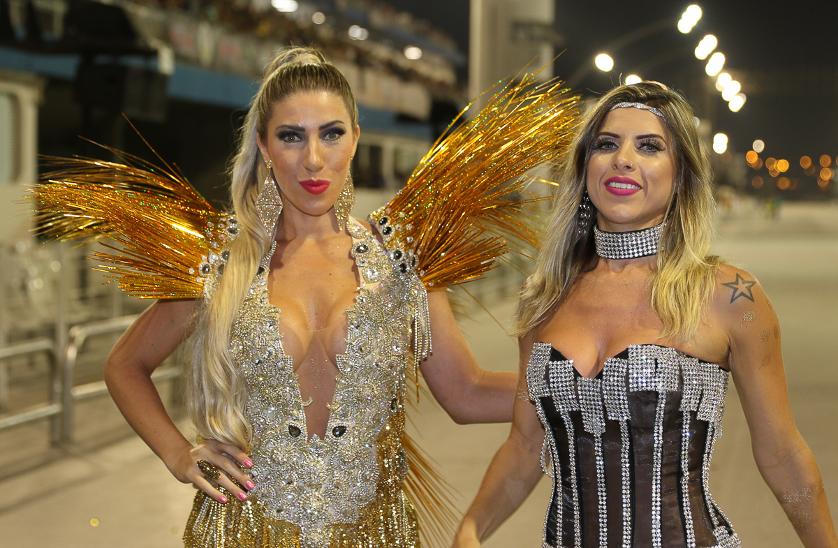 Tati e Ana Paula Minerato